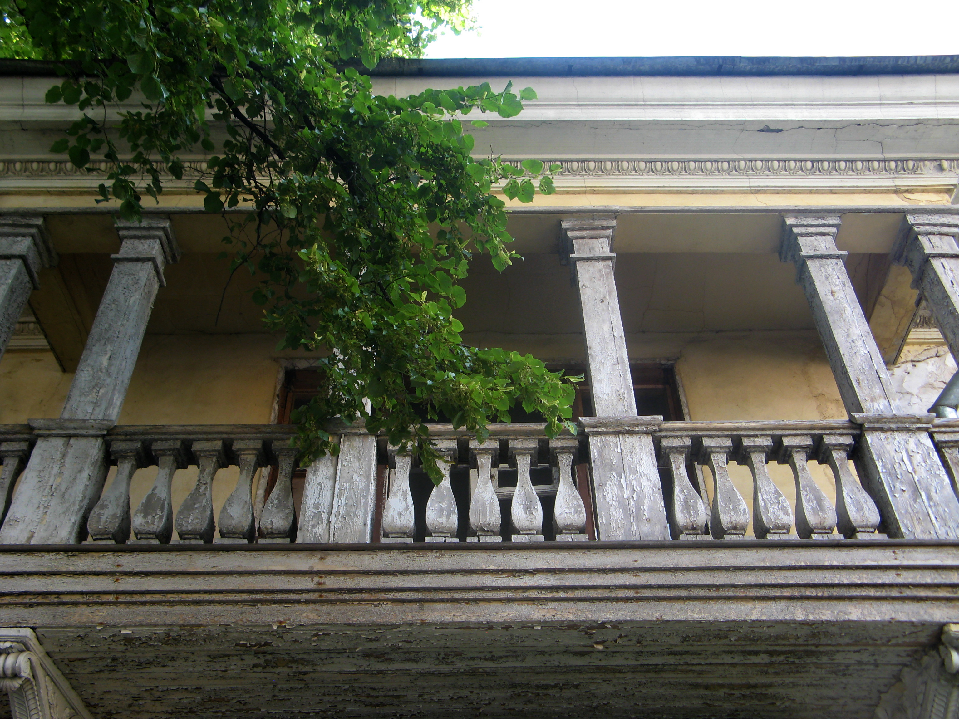 Дом В.И. Вуича, в котором в 1930-1938 гг. жил писатель А.Н. Толстой, в 1938-1941 гг. находился Дом творчества ленинградских писателей, в августе 1941 г. размещалась редакция газеты «За Советскую Родину»: Церковная улица, 6, Пушкин, Пушкинский район, Санкт-Петербург